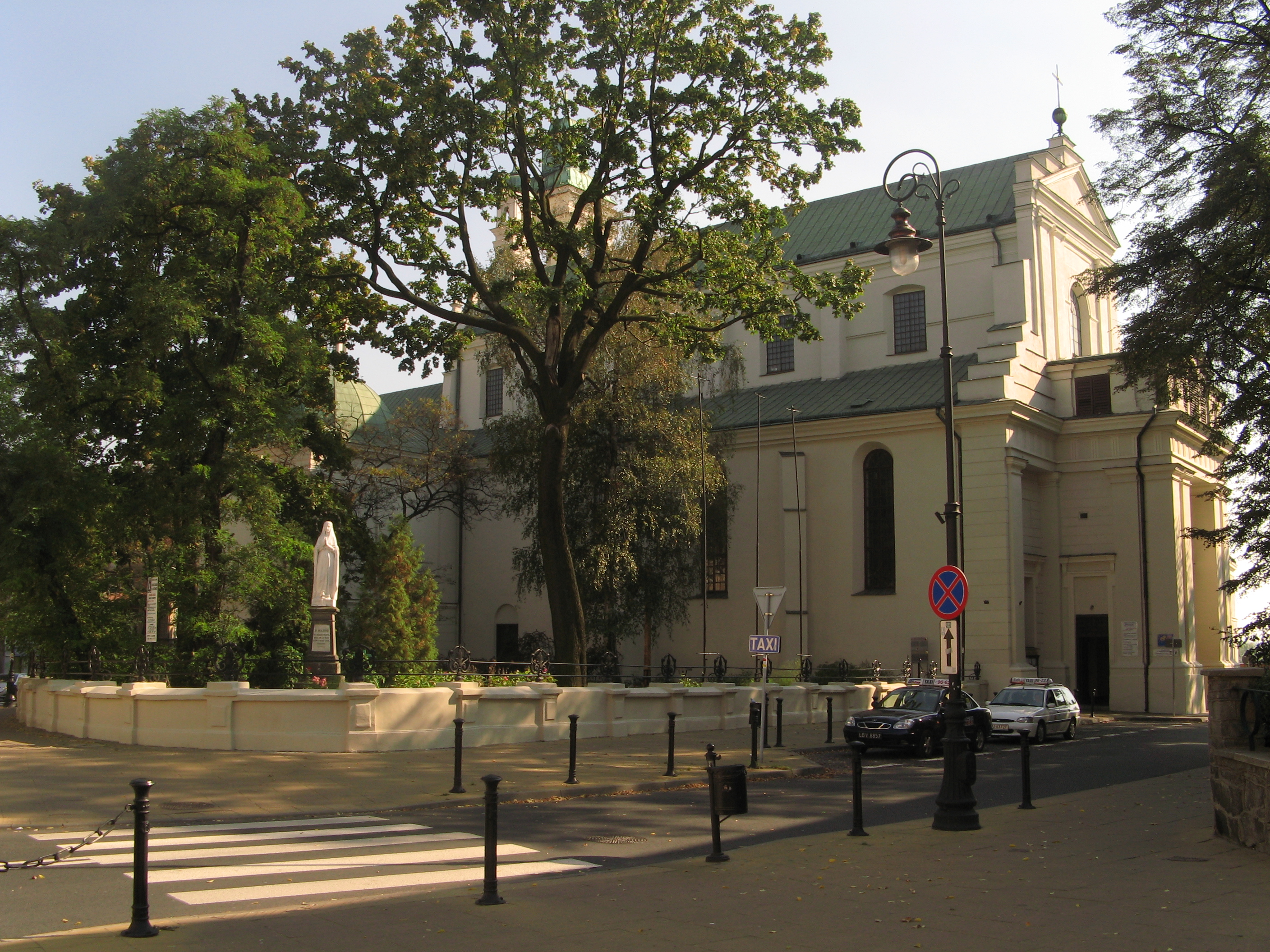 Kościół pobernardyński p.w. Nawrócenia św. Pawła w Lublinie.